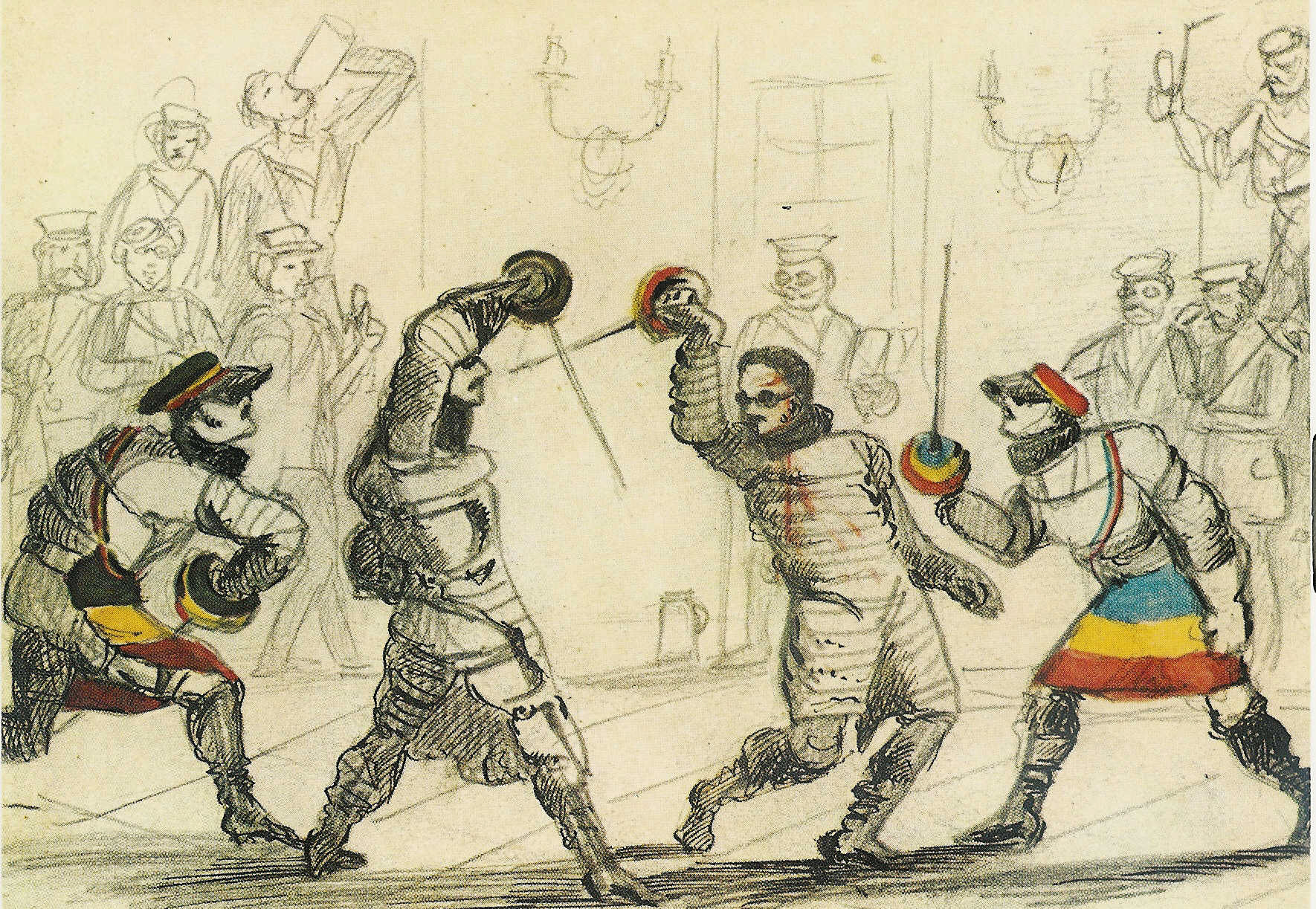 Würzburger Mensur aus dem Jahre 1868, Corps Moenania (links) mit Landsmannschaft Makaria (rechts). Academic fencing in Würzburg/Germany in 1868, a member of Corps Moenania (left) with a member of Landsmannschaft Makaria (right)